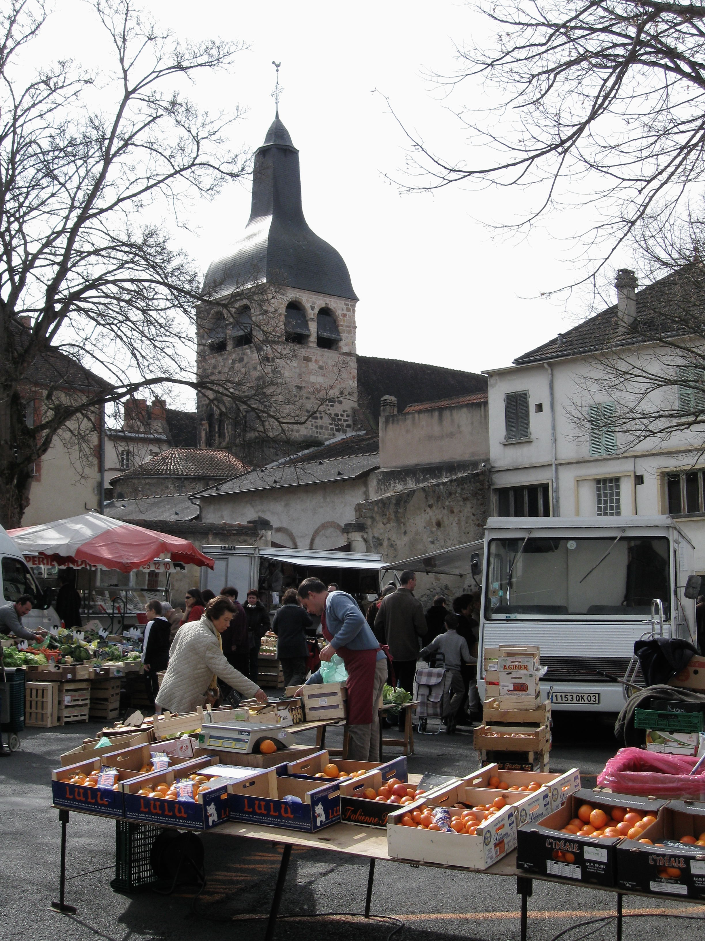 La place de la Poterie un jour de marché et l'église Saint-Pierre, Montluçon, Allier, France